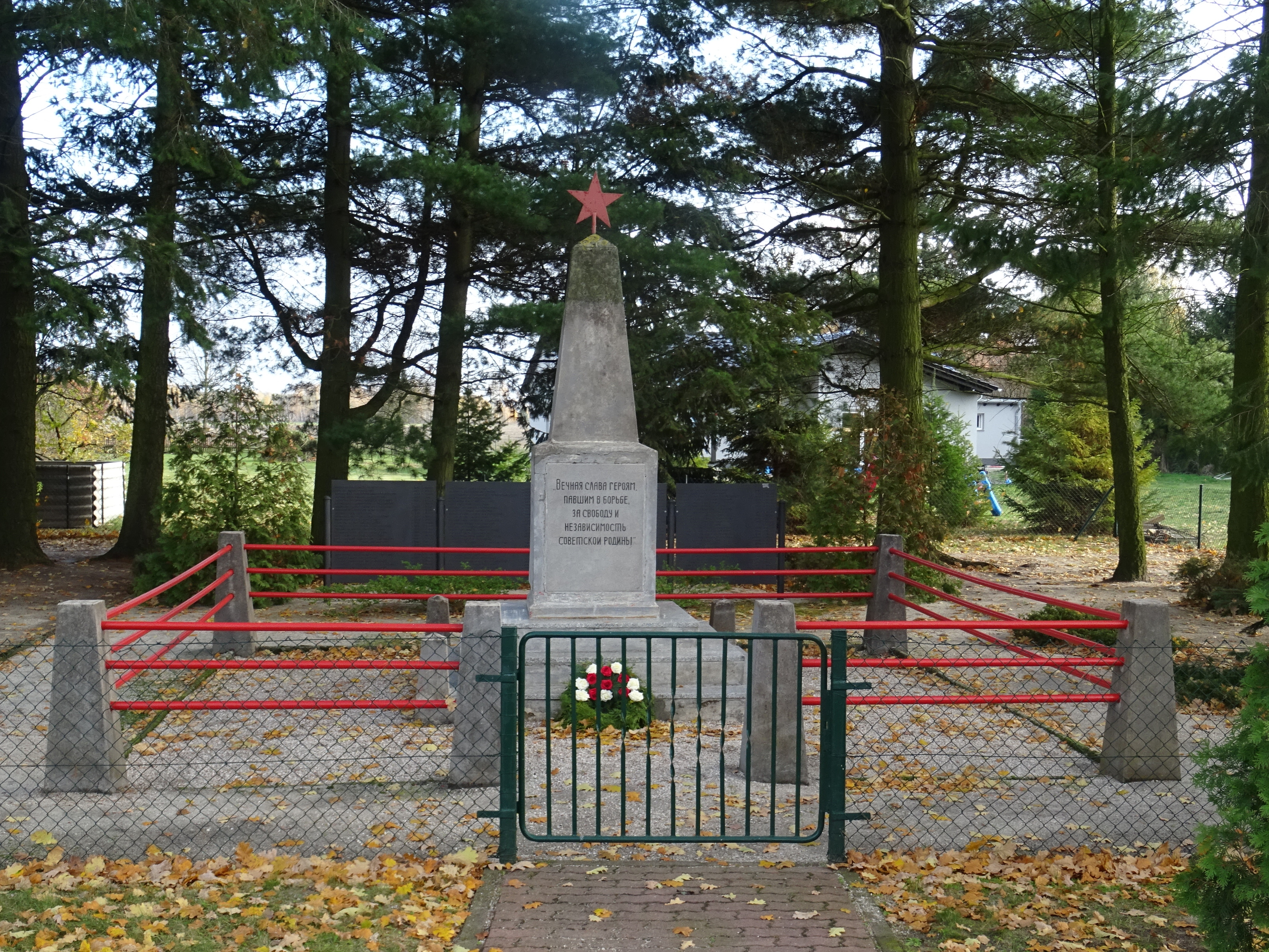 Ehrenmal für im Zweiten Weltkrieg gefallenen sowjetischen Soldaten in Jocksdorf, auf der Denkmalliste der Gemeinde Neiße-Malxetal